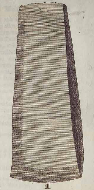 Feuersteinbeil aus einem Grabhügel (Großsteingrab?) bei Stolzenhagen, Wandlitz, Landkreis Barnim, Brandenburg